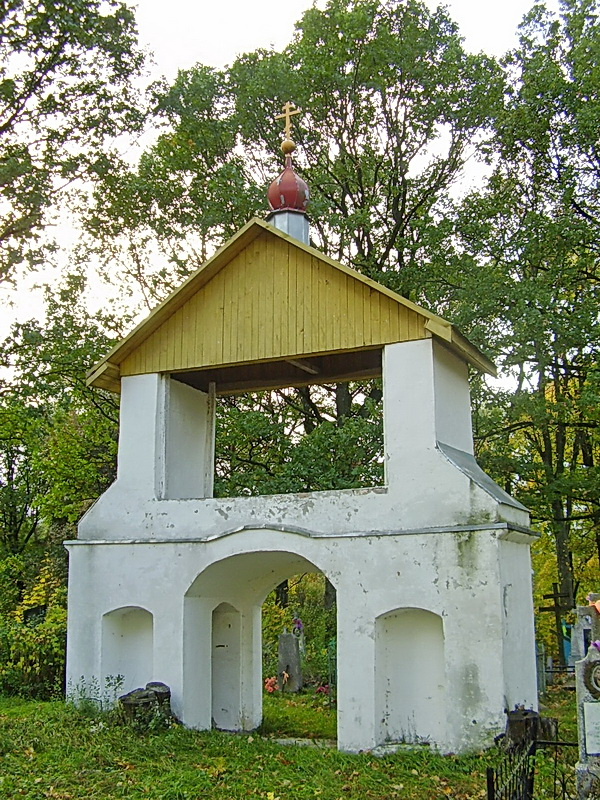 Яромічы. Свята-Міхайлаўская царква. Брама-званіца